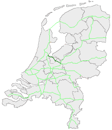 Locatie E231 (A1 Asd - Amf), zelf gemaakt